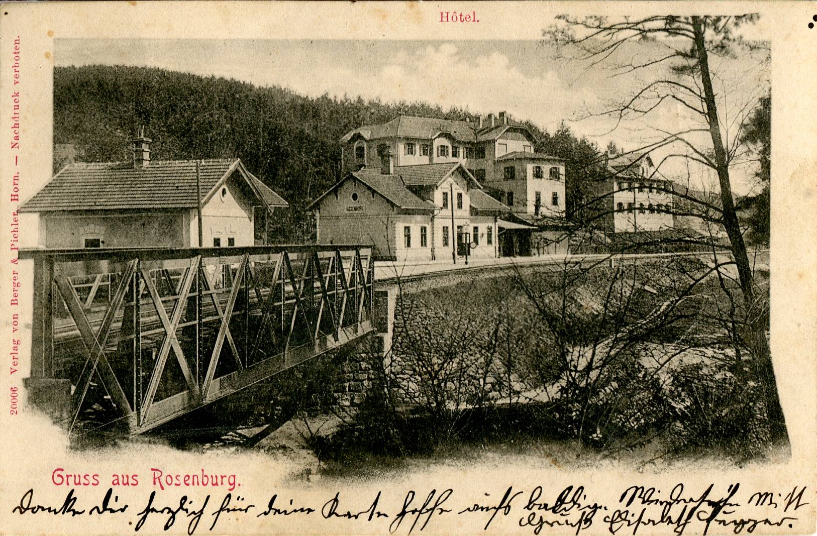 Bahnhof Rosenburg am Kamp, Niederösterreich. Ansichtskarte um 1900